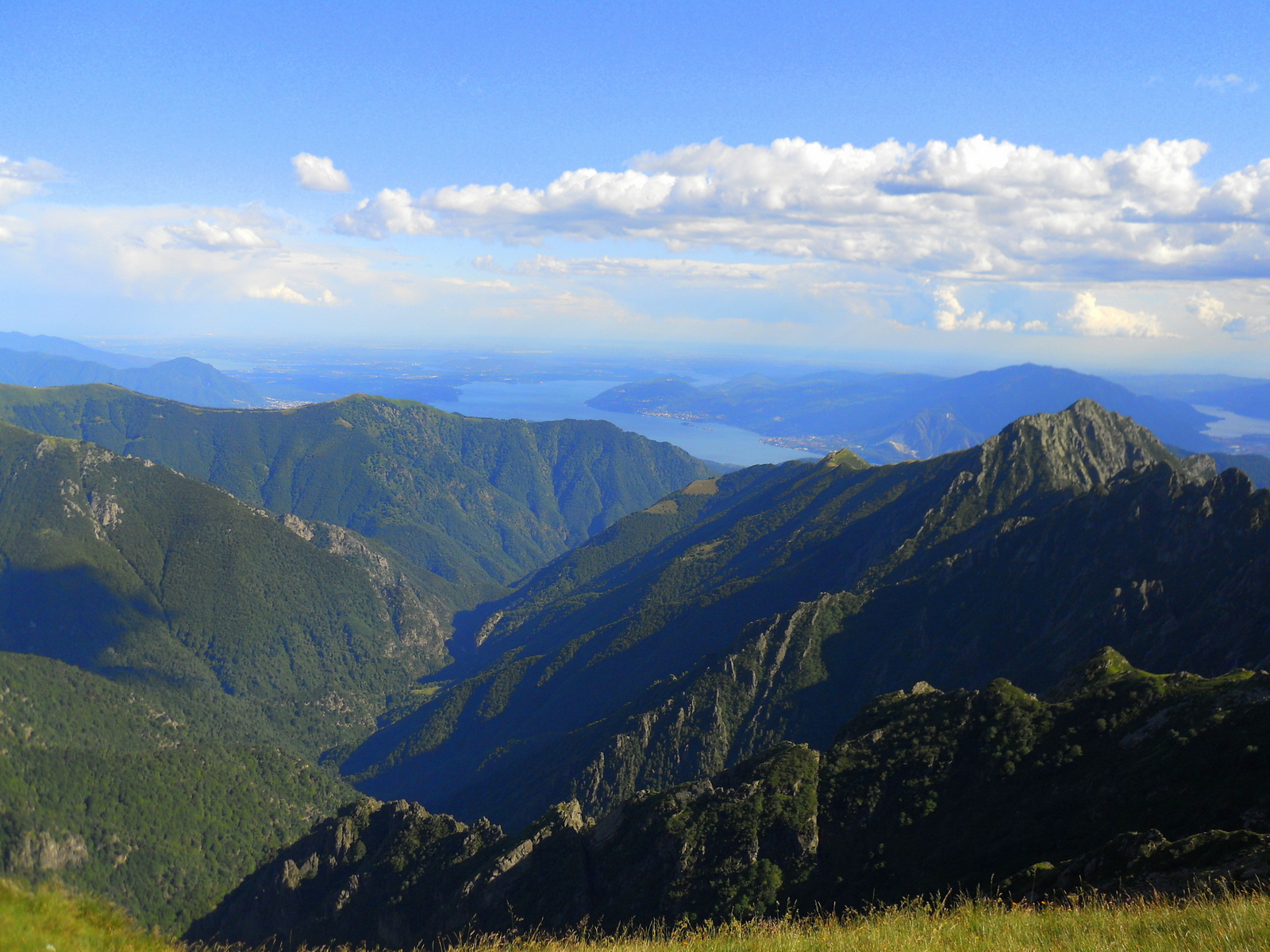 Lago Maggiore e solco della Val Grande, dalla B.tta di Scaredi (2.095)